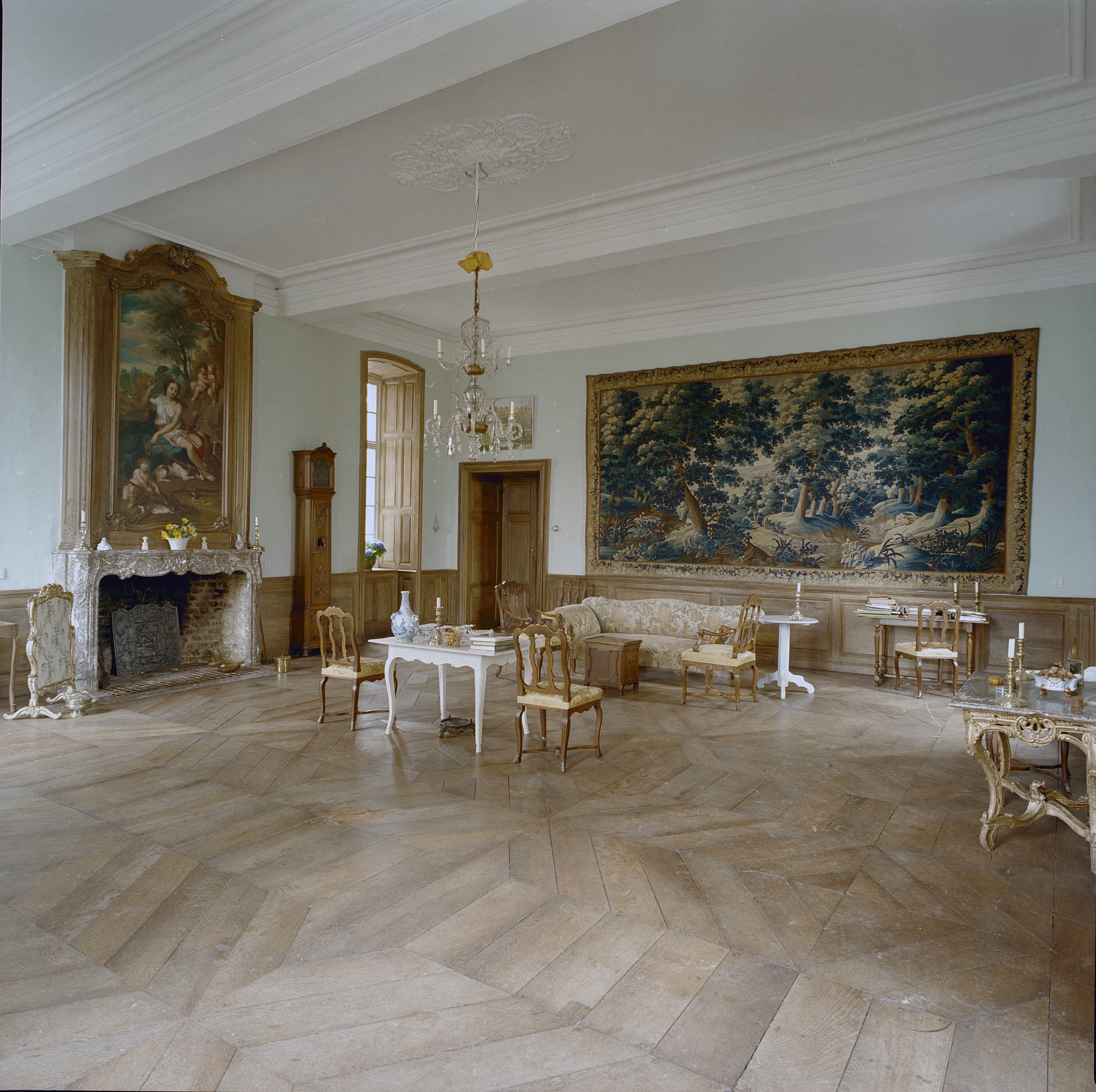 Kasteel Genhoes: Interieur overzicht zaal